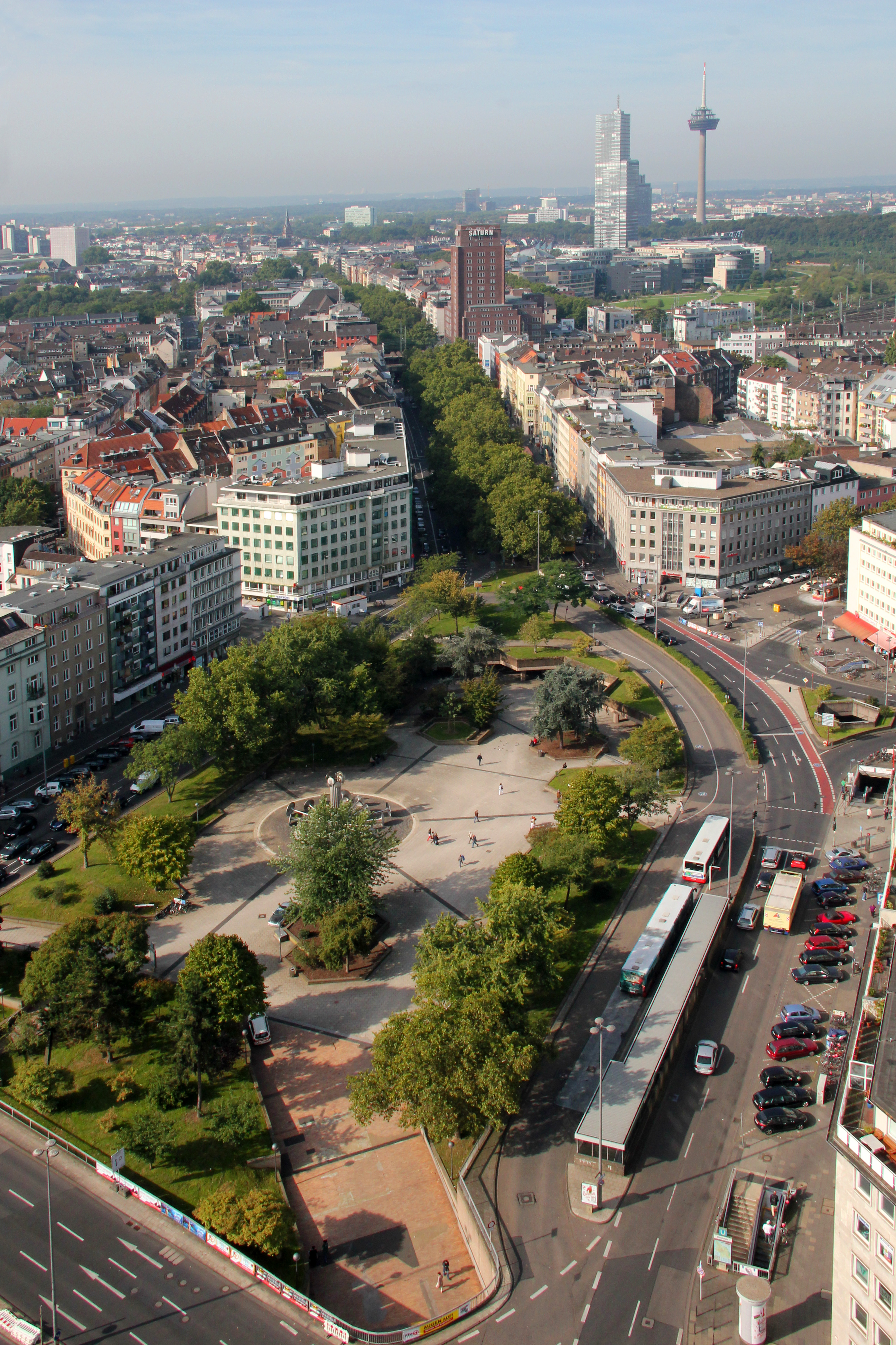 Köln, Ebertplatz, Hansaring und Agnesviertel